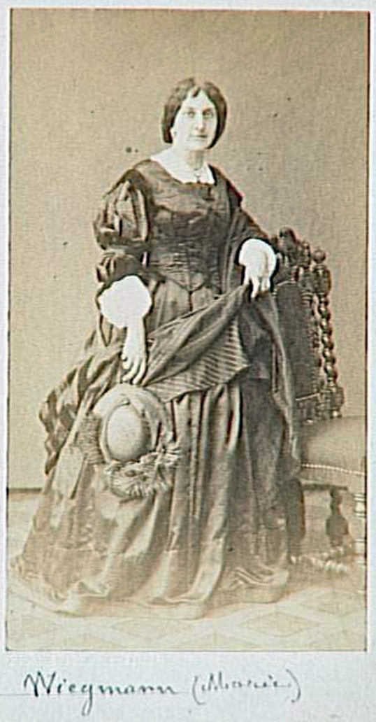 Fotografie von Marie Wiegmann, Arnold Overbeck, Gebr. G. & A. Overbeck in Düsseldorf